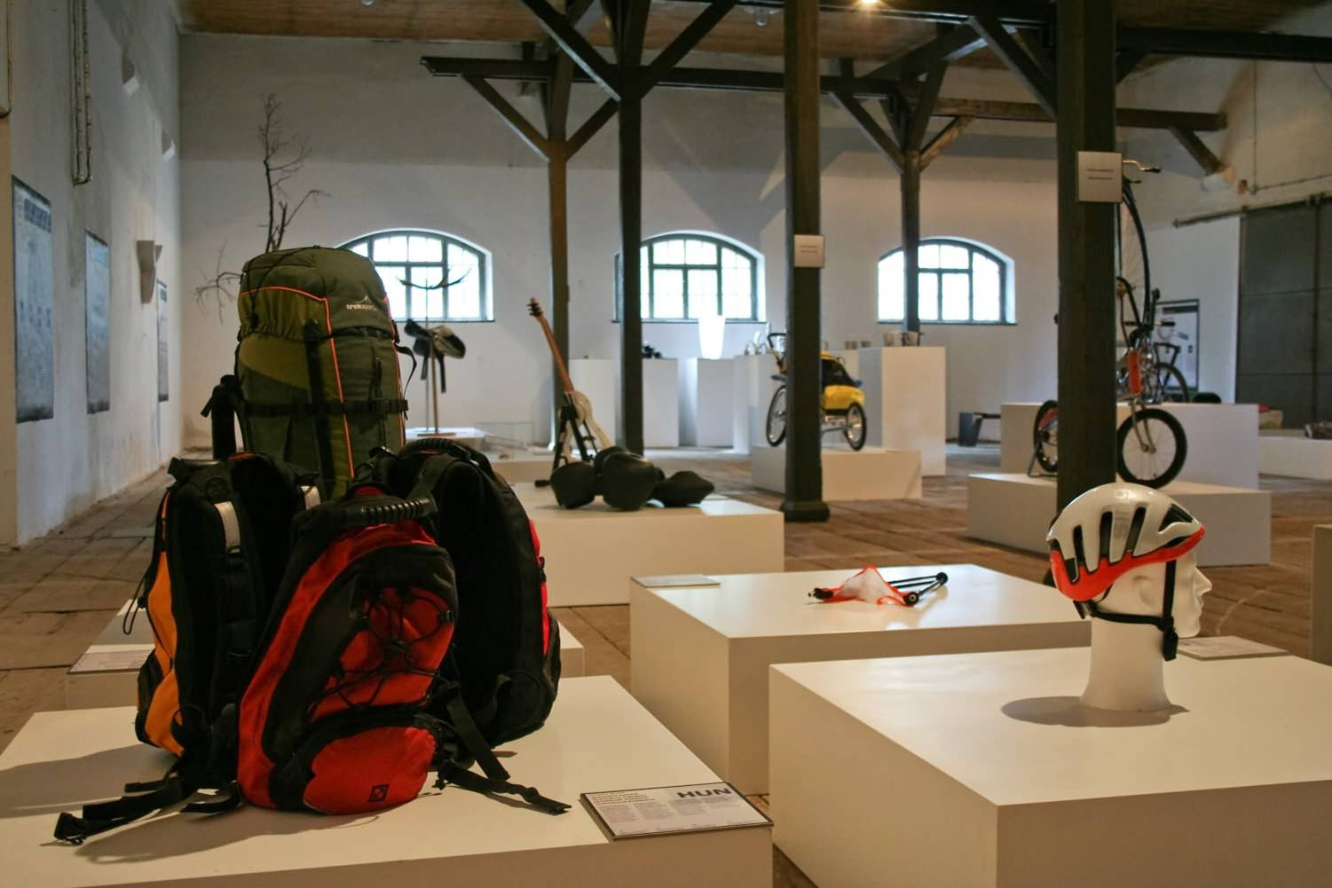 Design Match, přehlídka designu v rámci kandidatury Košice -Evropské hlavní město kultury, 2008